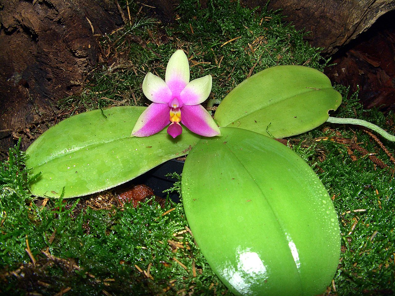 Phalaenopsis bellina - plant